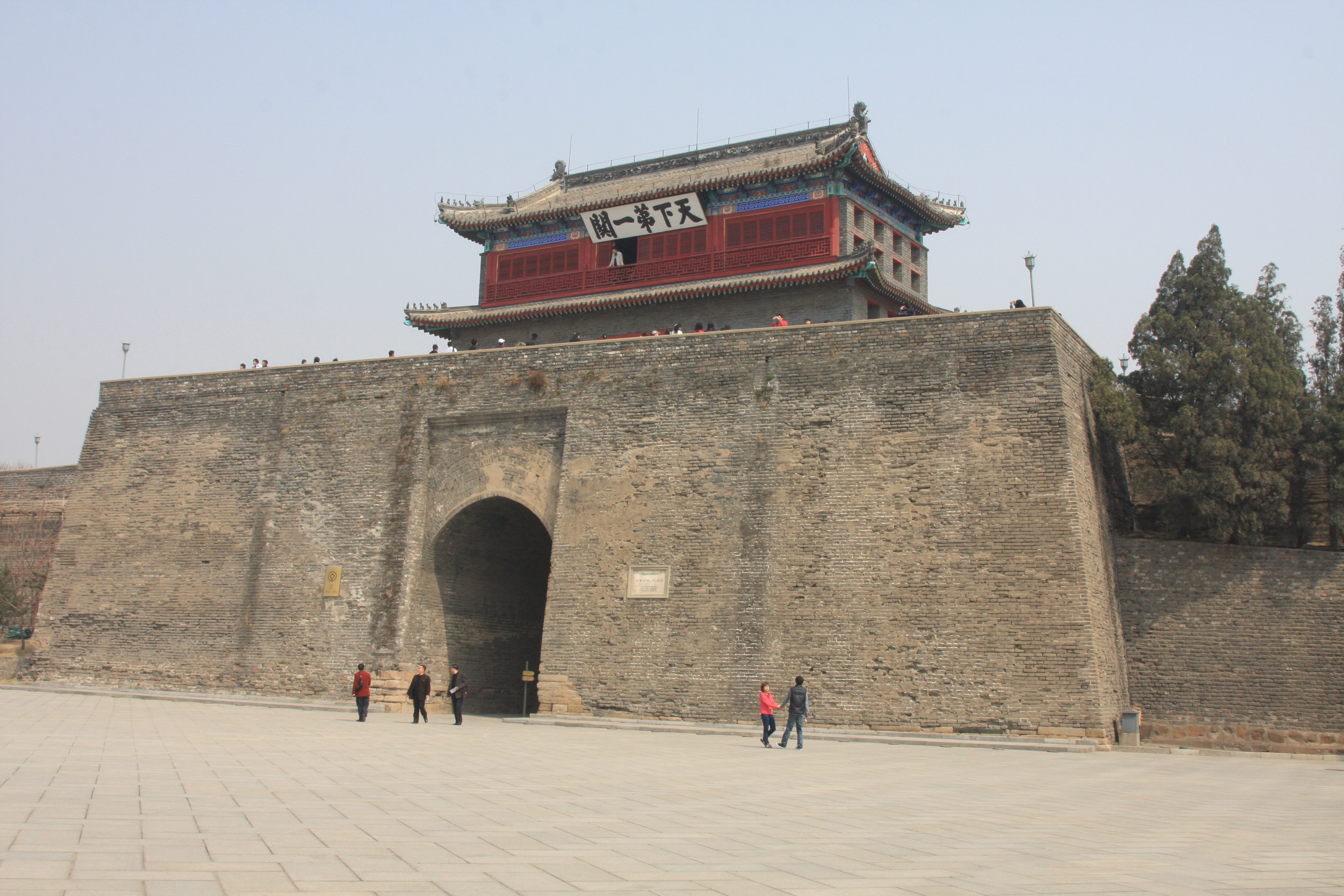 天下第一关(山海关)